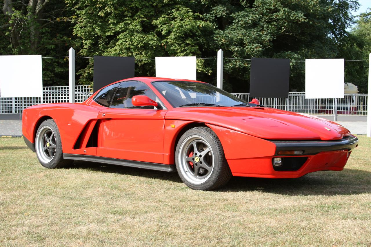 FZ93 (Formula Zagato 1993), Ferrari Testarossa chassis number 83935